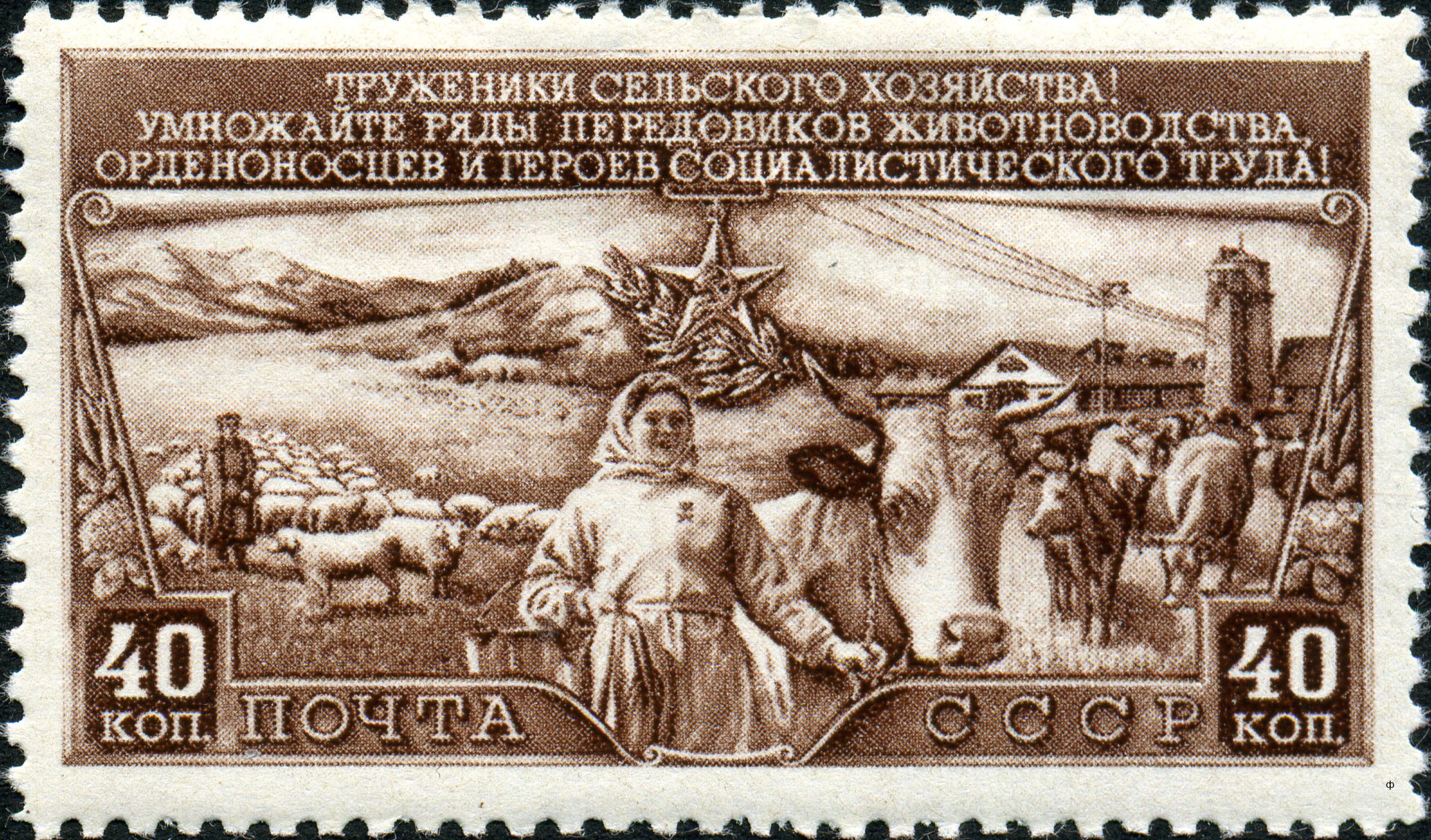 Марка СССР